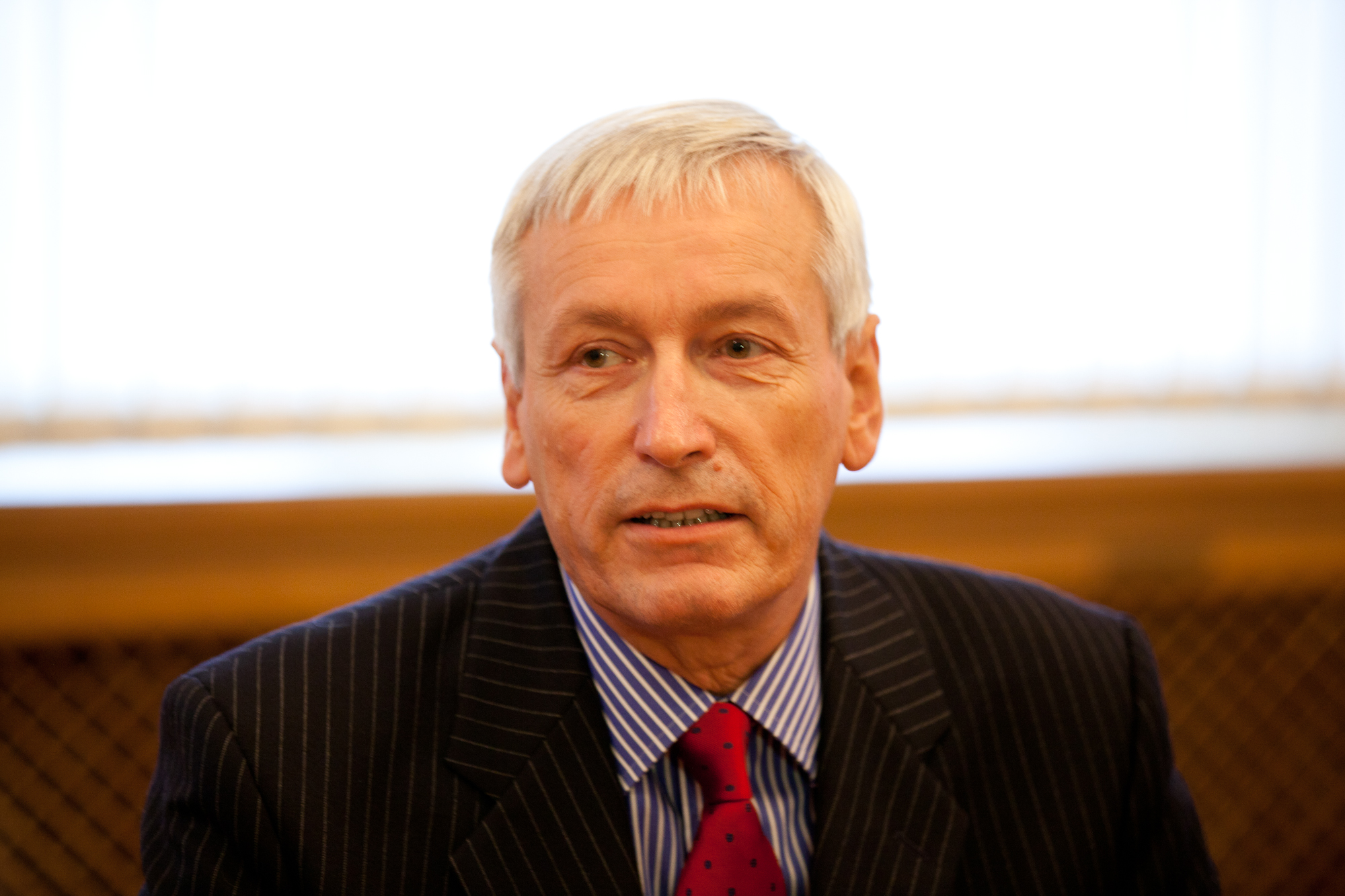 Attēlā: Satversmes aizsardzības biroja priekšnieks Jānis Kažociņš Foto: Toms Norde/ Valsts kanceleja